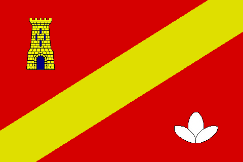 Bandera Municipal de Torrejón de Velasco (Madrid)